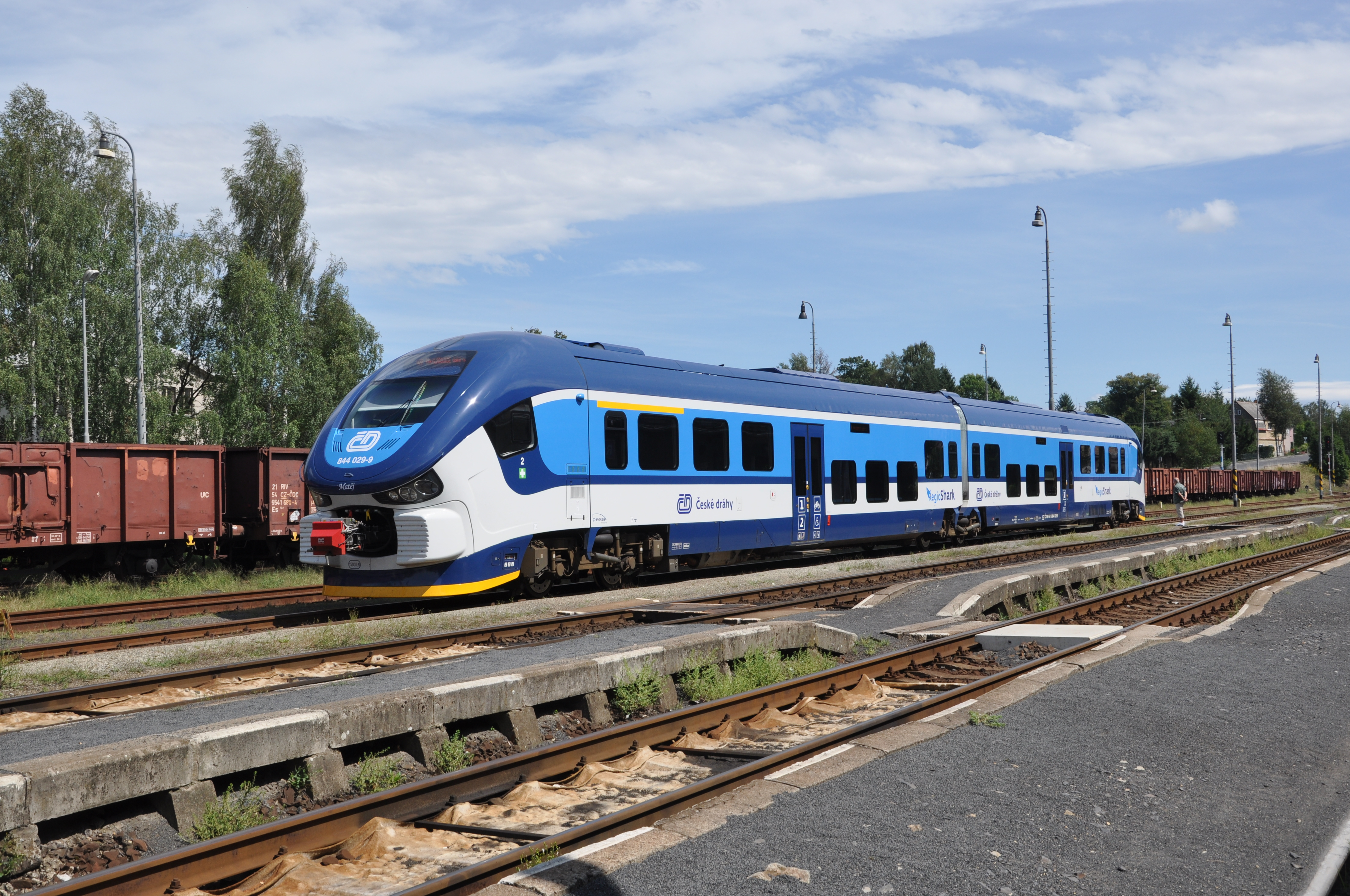 Reisezug der Linie U27 im Bahnhof Rumburk